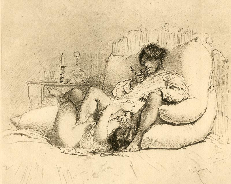 Mihály Zichy: (Making love) 1911